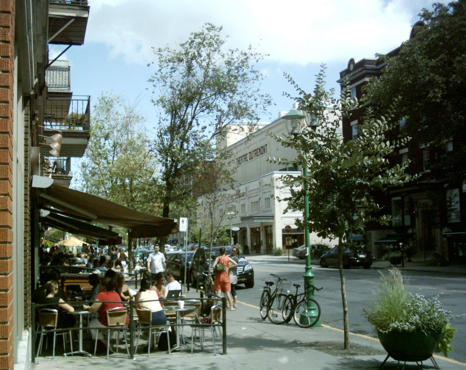 Rue Bernard dans l'arrondissement Outremont à Montréal Vue de terrasses face au Théâtre Outremont